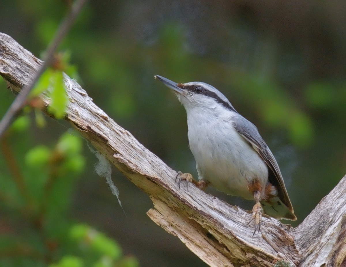 Sitta europaea europaea, Önneröd, Västra Frölunda, Vastra Gotaland, Sweden